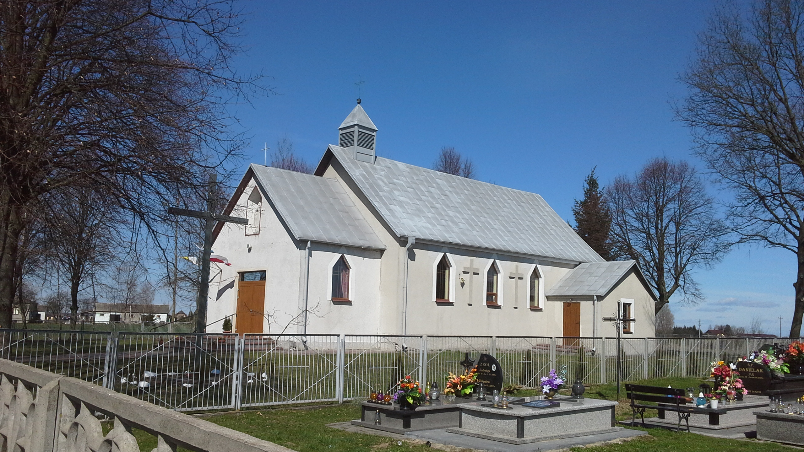 Kościół i cmentarz przykościelny w Wakijowie